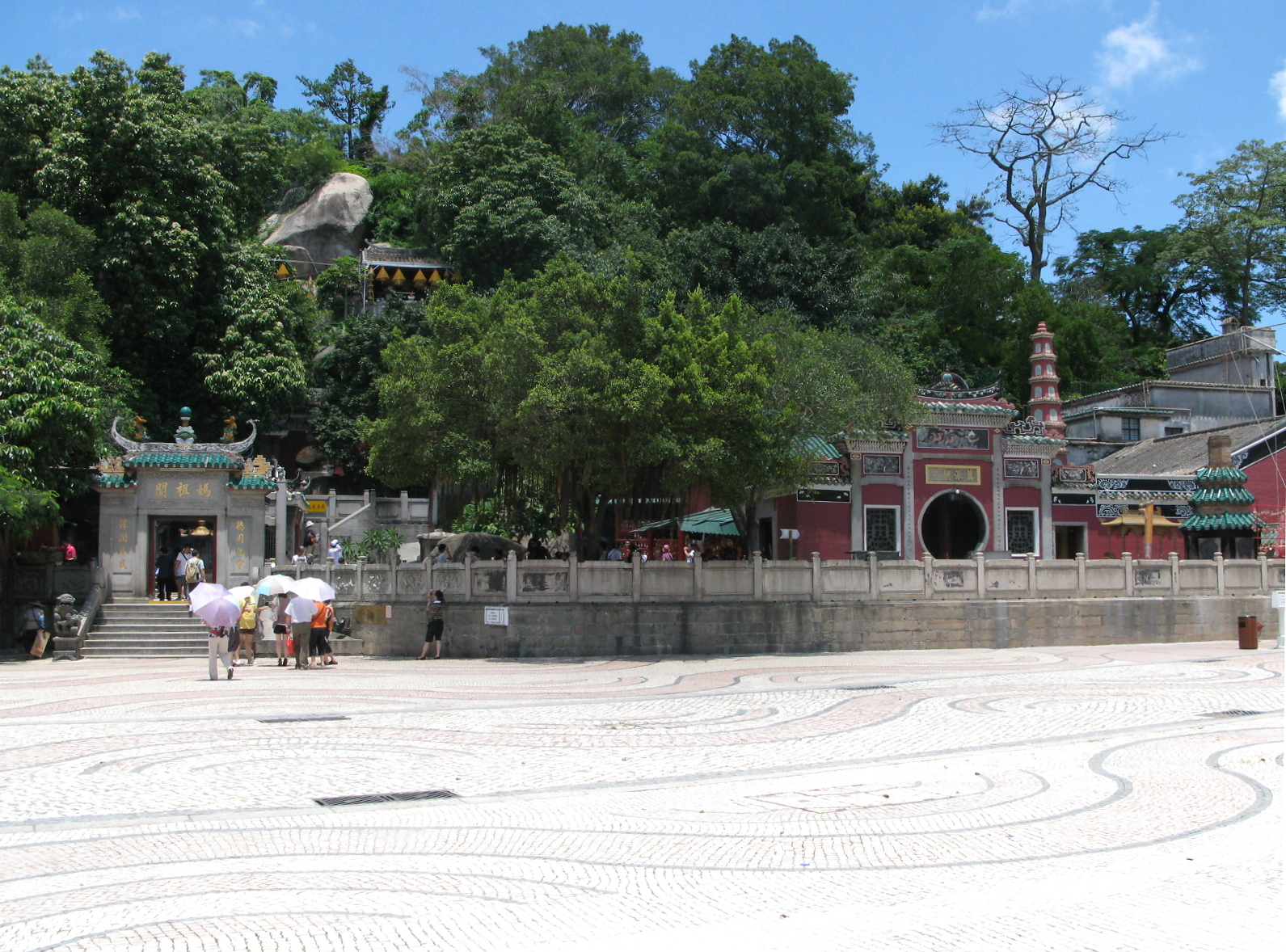 媽閣廟 A-Ma Temple